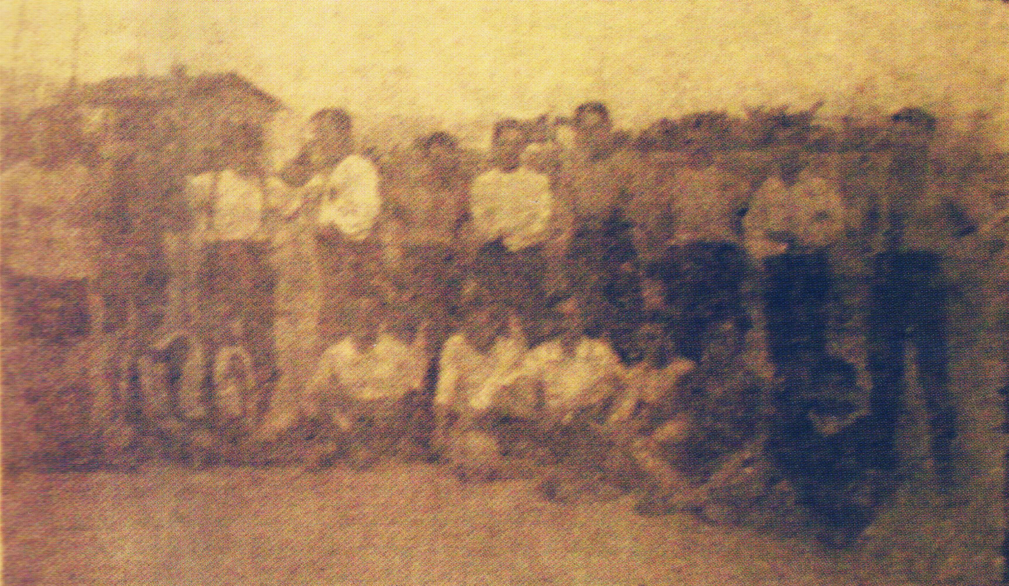 Ο Πανελλήνιος Ποδοσφαιρικός Όμιλος, βασικοί και αναπληρωματικοί αθλητές μετά από προπόνηση το 1912. Όρθιοι από αριστερά: Παπαγεωργίου, Γ. Δουκάκης, Γρανίτσας, Γαέτας, Παπαδημητρίου, Δεμερτζής, Σαπουνάς, Ρετσινόπουλος, Αναγνωστόπουλος Καθιστοί: Χοϊδάς, Πάσχου, Καλαφάτης, Δελαγραμμάτικας, Δ. Δουκάκης, Γαρουφαλιάς, Καγκάδης